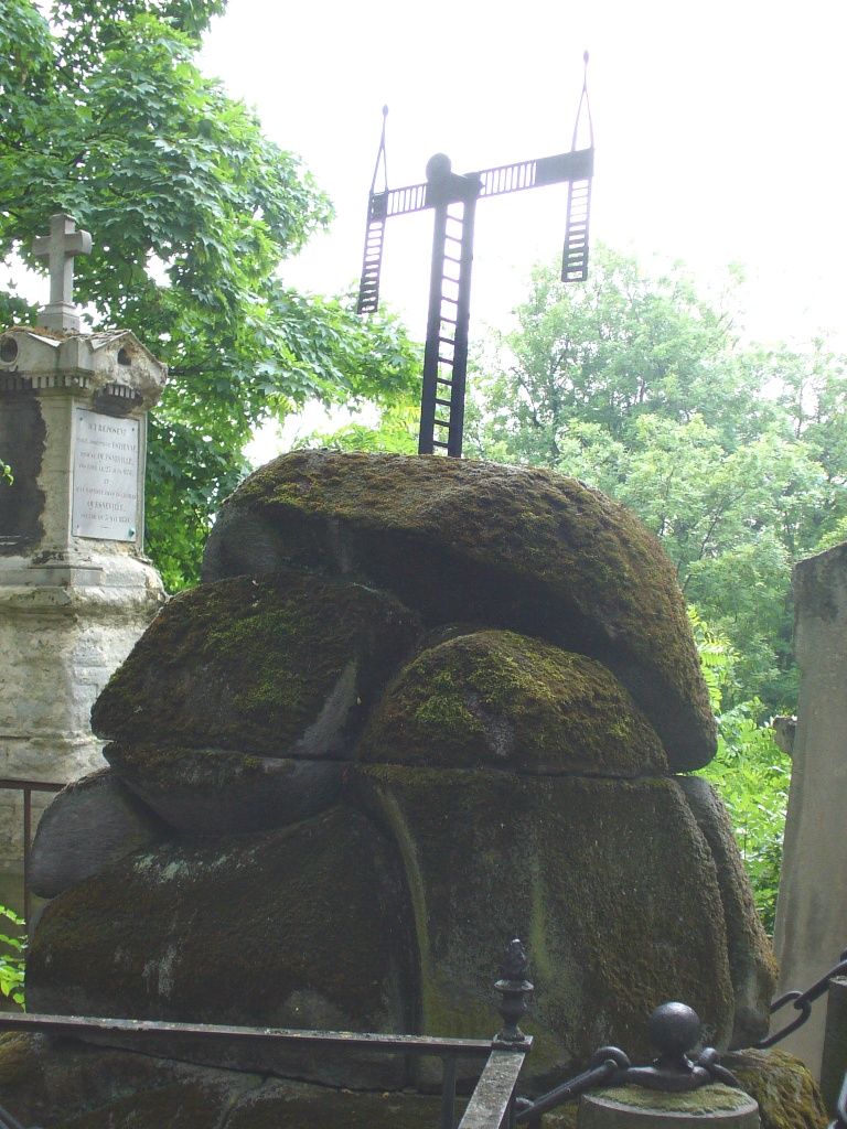 Tombe de Claude Chappe au Père Lachaise (Paris)